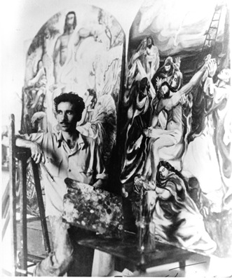 Mariano mientras pintaba sus obras Descendimiento y Resurrección para la Iglesia de Bauta, ca. 1943